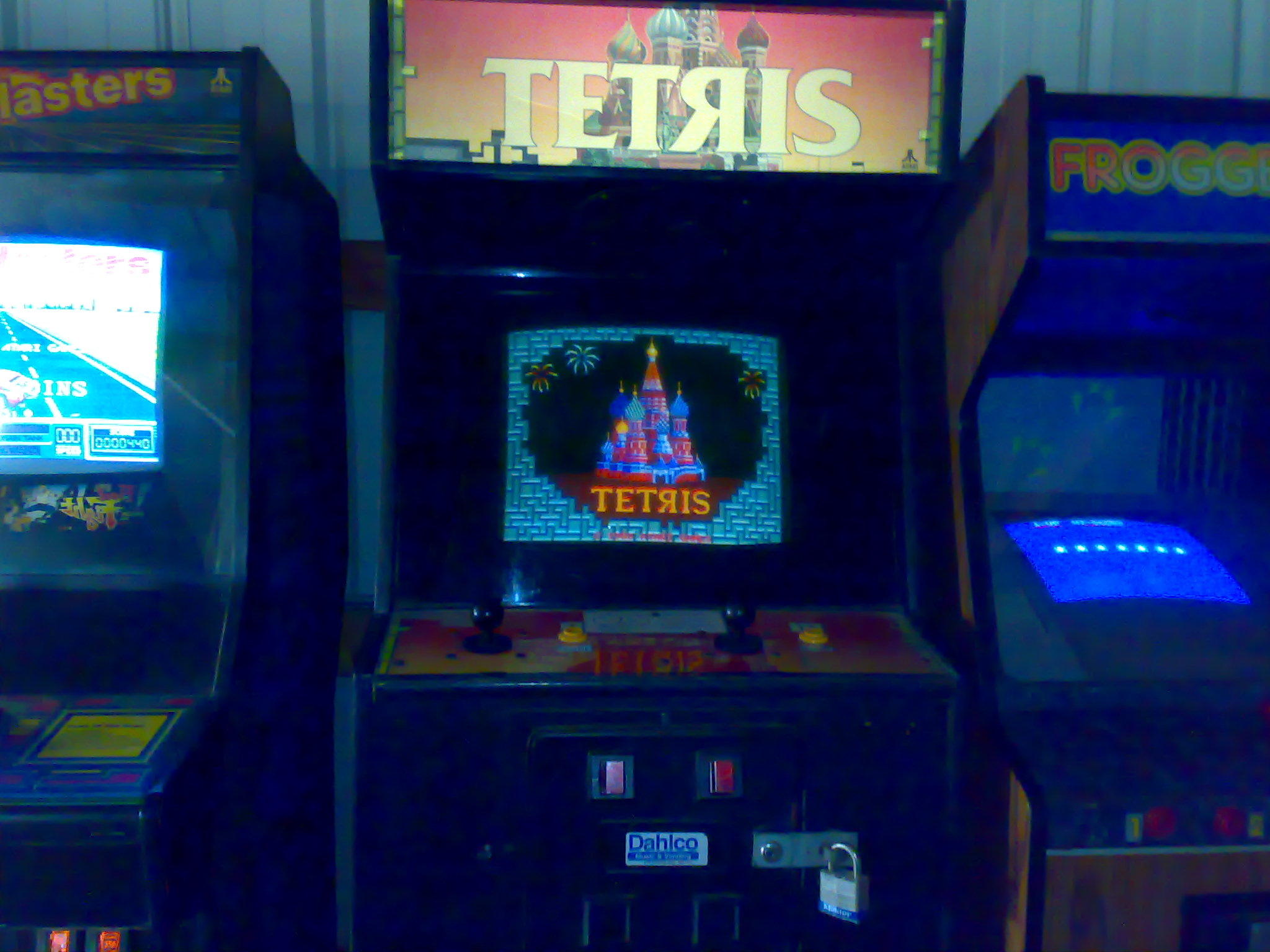 8-bit, original Tetris arcade game